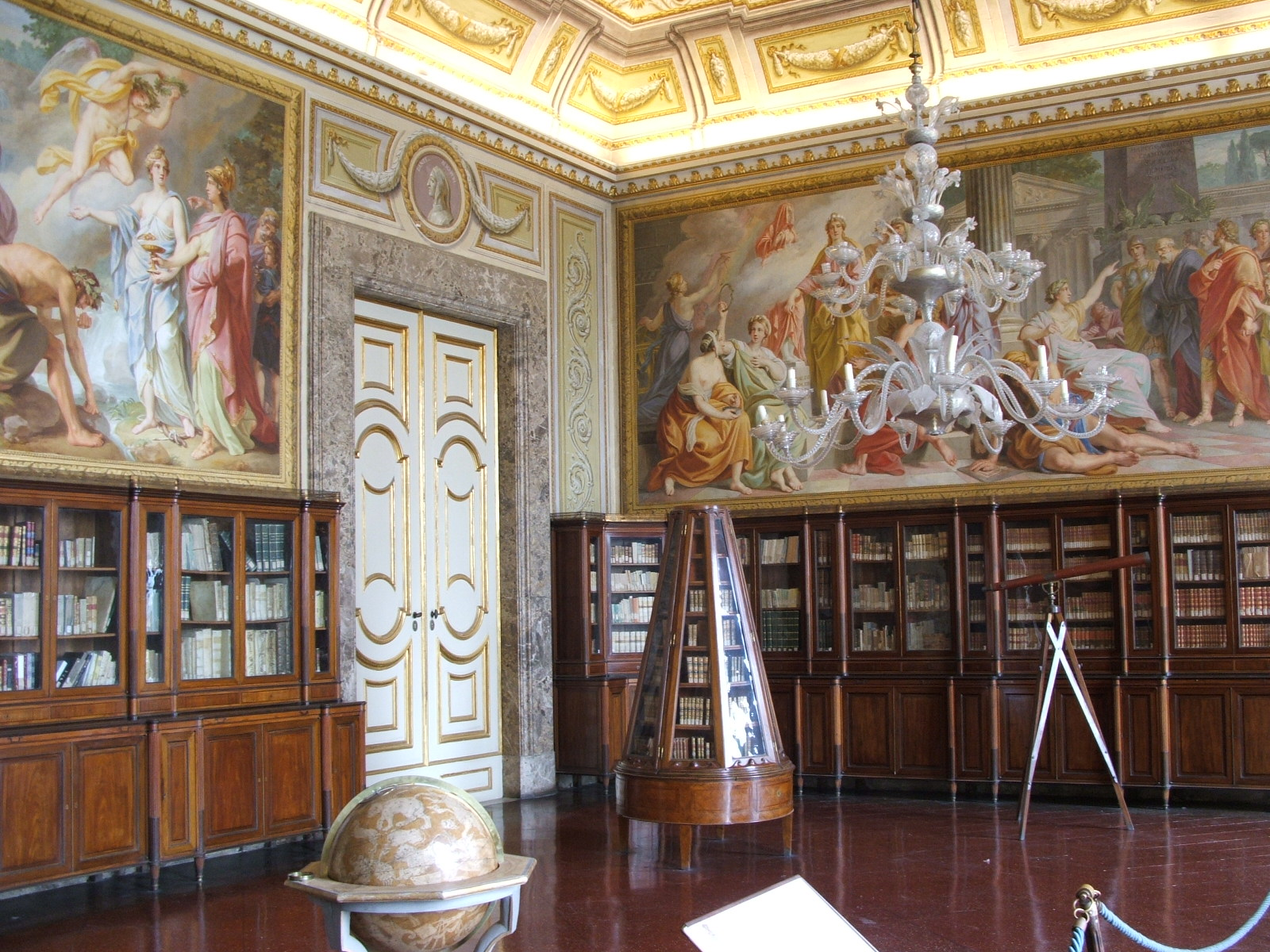 Caserta, Reggia di Caserta. La Biblioteca Palatina, di gusto neoclassico e finemente affrescata e dotata di librerie realizzate a boiserie da maestranze locali. Da notare al centro della stanza l'originale libreria girevole in mogano e palissandro la cui particolare struttura favoriva alla regina una comoda lettura.